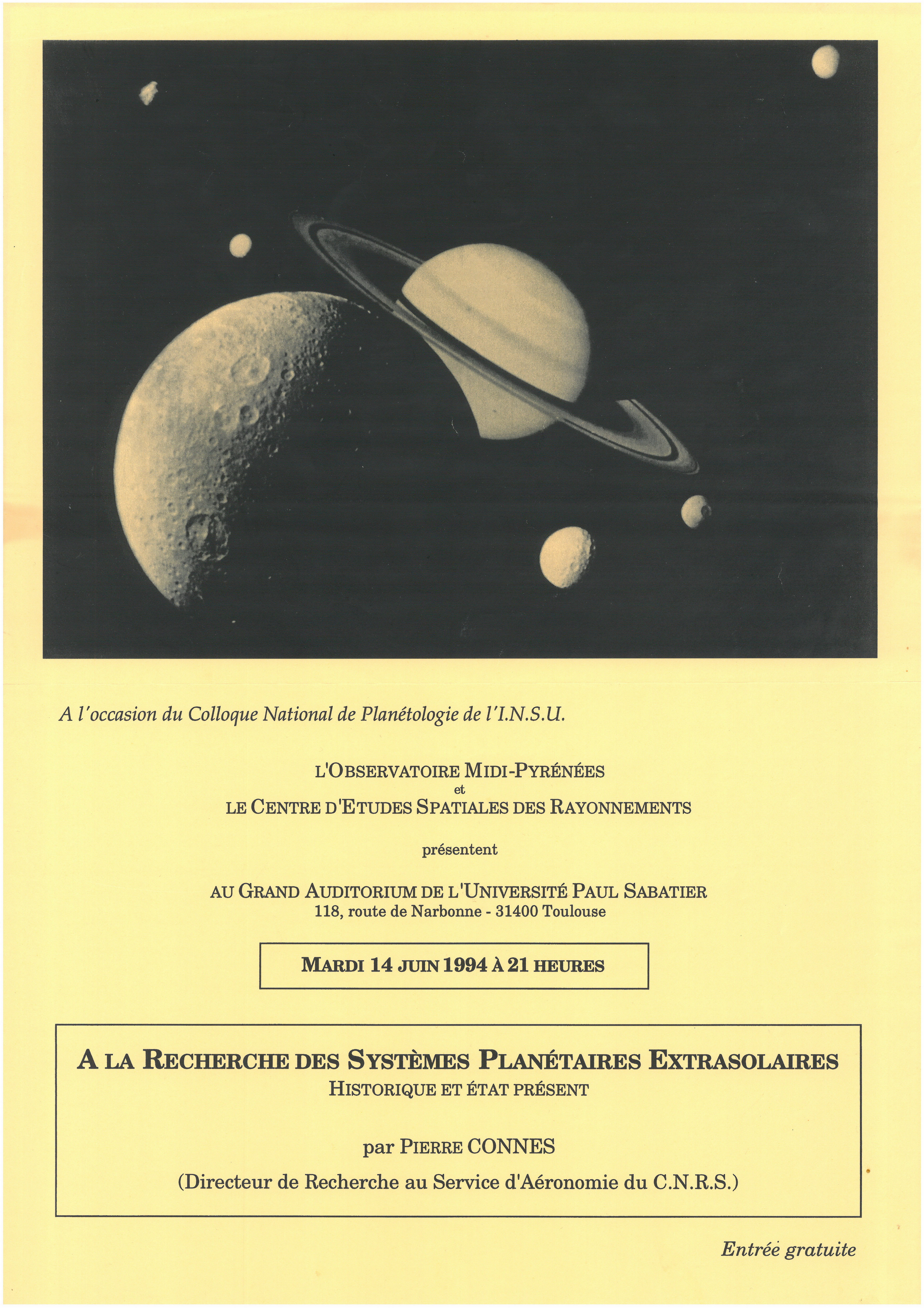 Affiche de la conférence donnée par Pierre Connes lors du colloque national de Planétologie de l'INSU